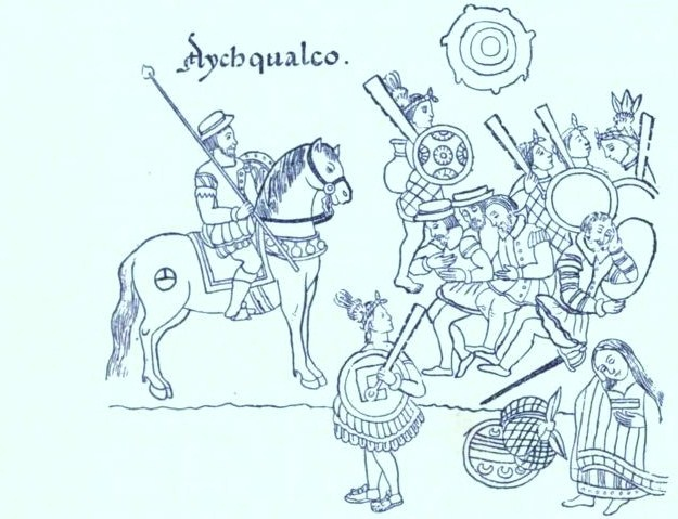 Representación de Aychqualco en el Lienzo de Tlaxcala. En este lugar los conquistadores españoles descansaron en su marcha de Tenochtitlan a Tlaxcala, después de la Noche Triste y antes de la batalla de Otumba en julio de 1521.